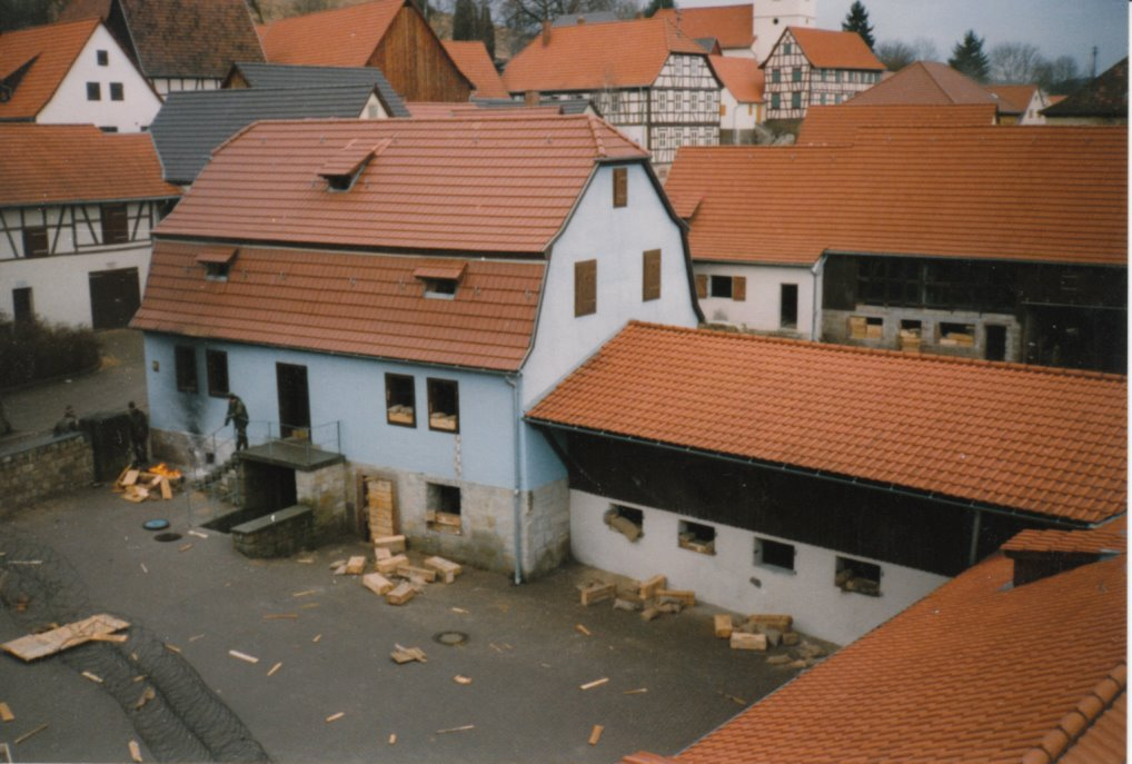 Sicht auf das "Blaue Haus mit Anbau und Scheune"